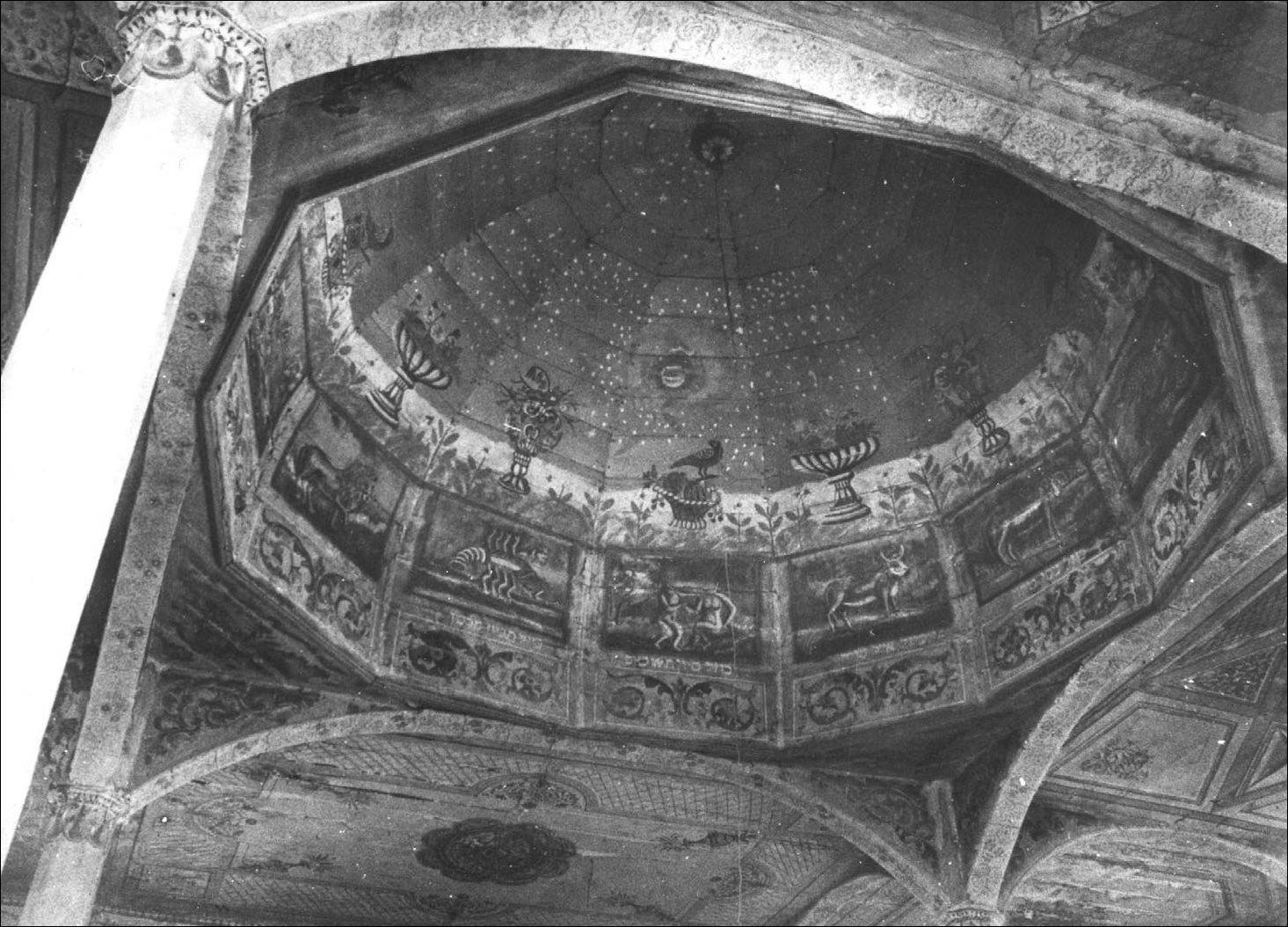 Внутрішний вигляд дерев'яної синагоги Торговиці.